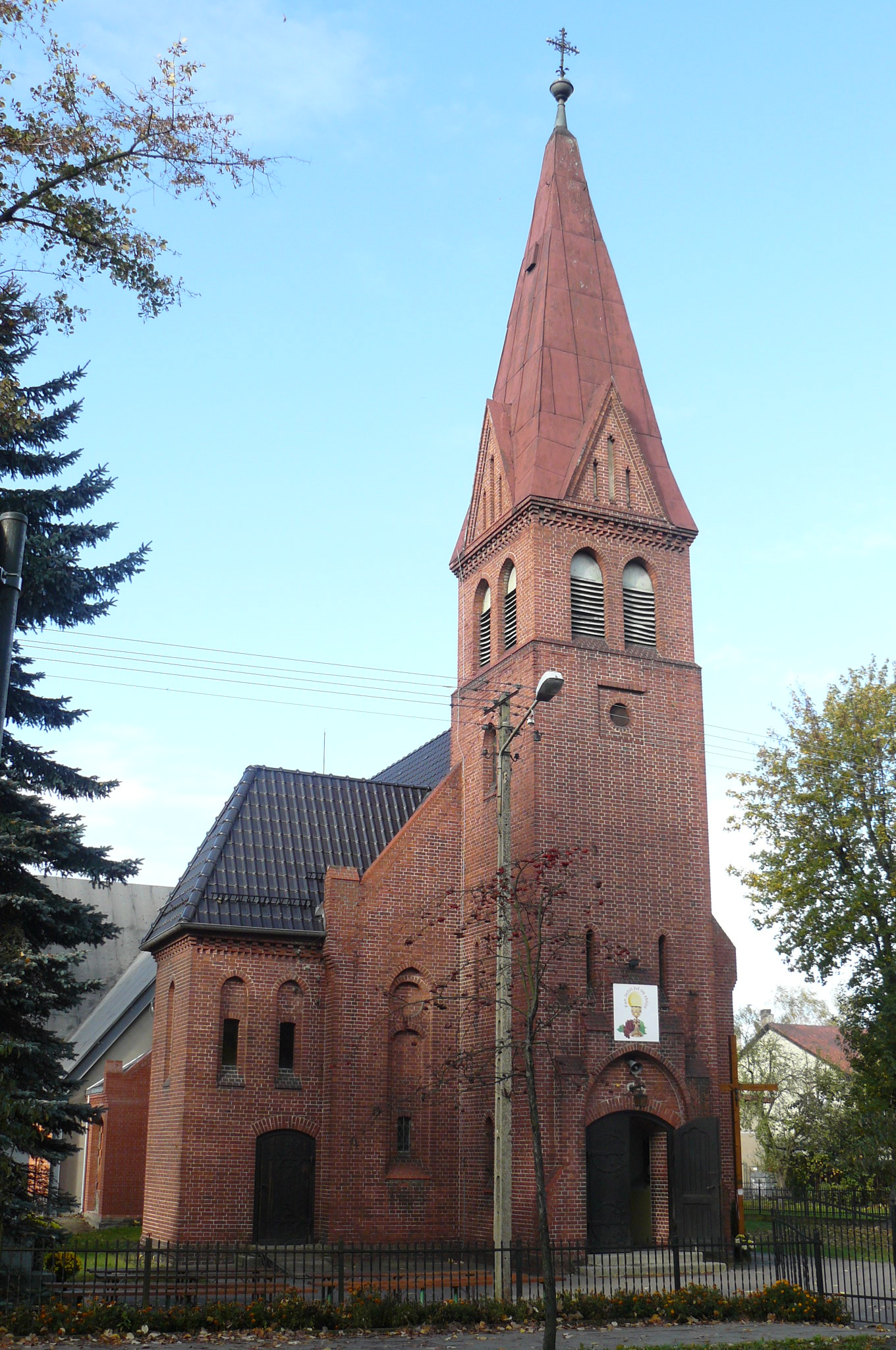 Kościół w Rokietnicy z dobudówką (10.2014r.).